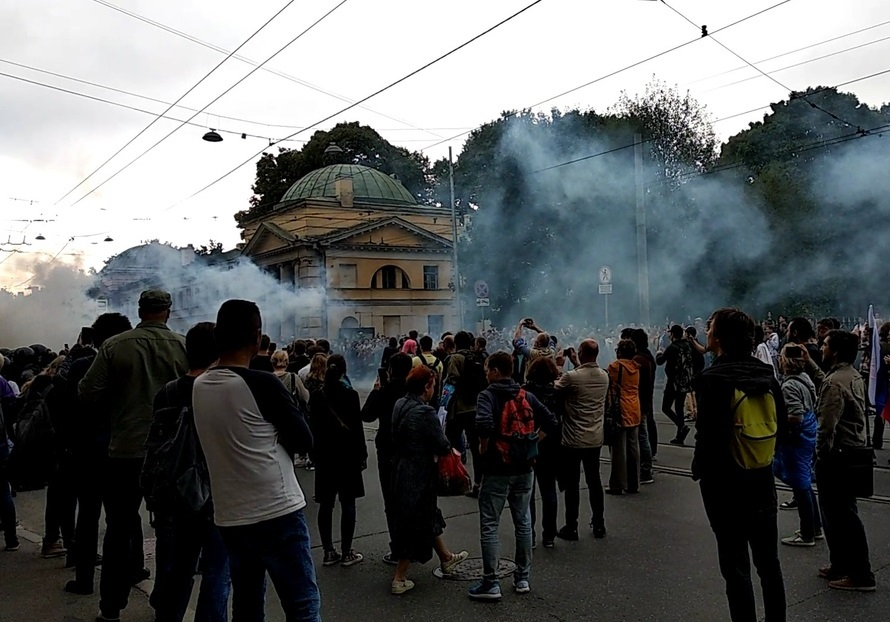 Акция 9 сентября против повышения пенсионного возраста в СПб, протестующие выкинули дымовую шашку возле Военно-медицинской академии имени С. М. Кирова